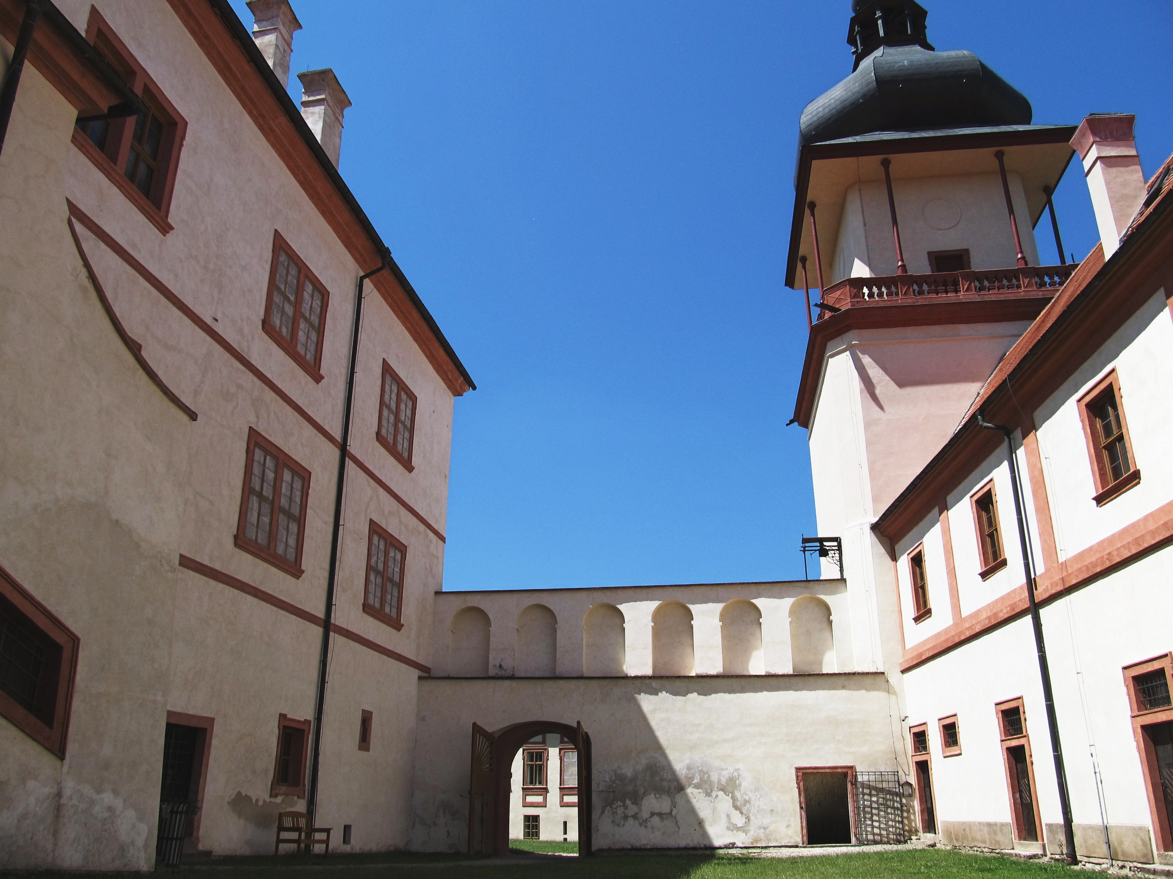 Druhé nádvoří